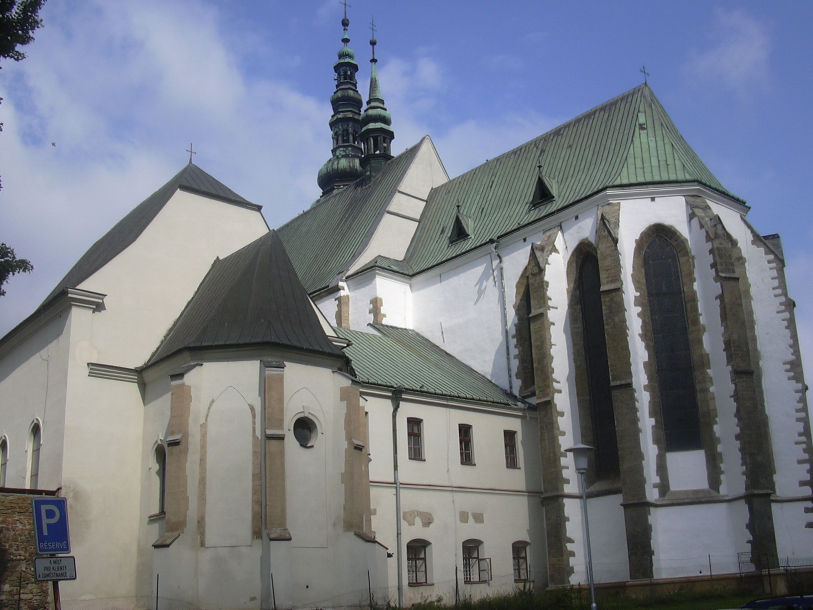 Farní kostel Povýšení sv. Kříže a bývalý klášter augustiniánských kanovníků (Prostějov - Czech Republic)